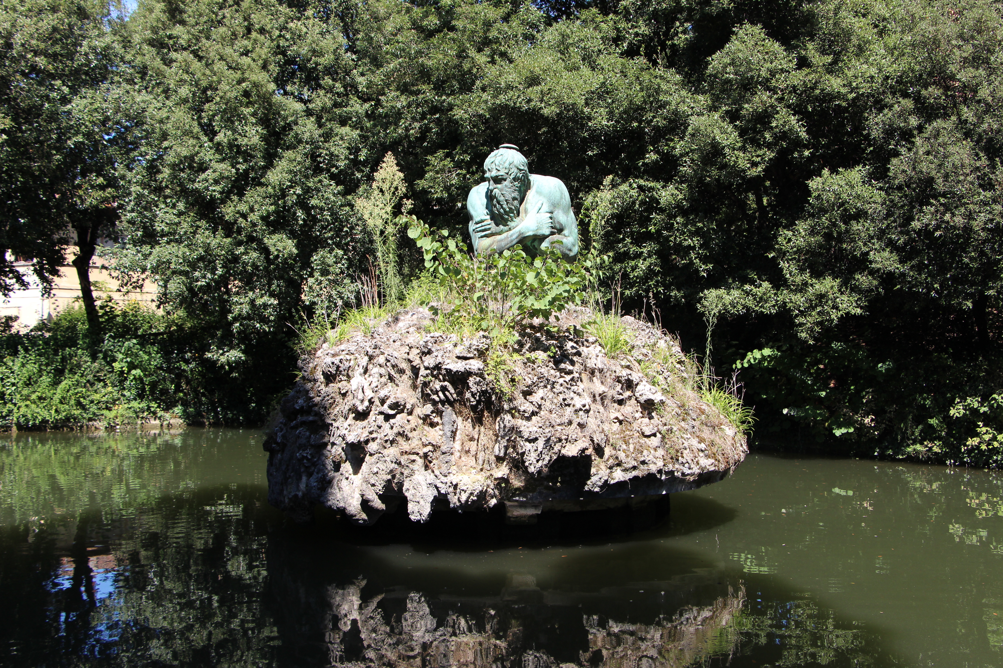 Giardino della Villa medicea di Castello - MIBAC The making of this document was supported by Wikimedia CH. (Submit your project!) For all the files concerned, please see the category Supported by Wikimedia CH. This is a photo of a monument which is part of cultural heritage of Italy.